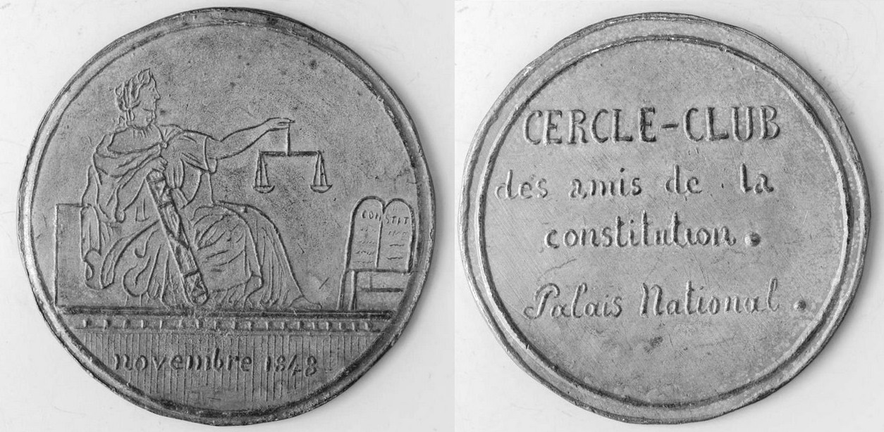 Médaille du cercle-club des amis de la constitution, au Palais national (5,4 cm de diamètre).